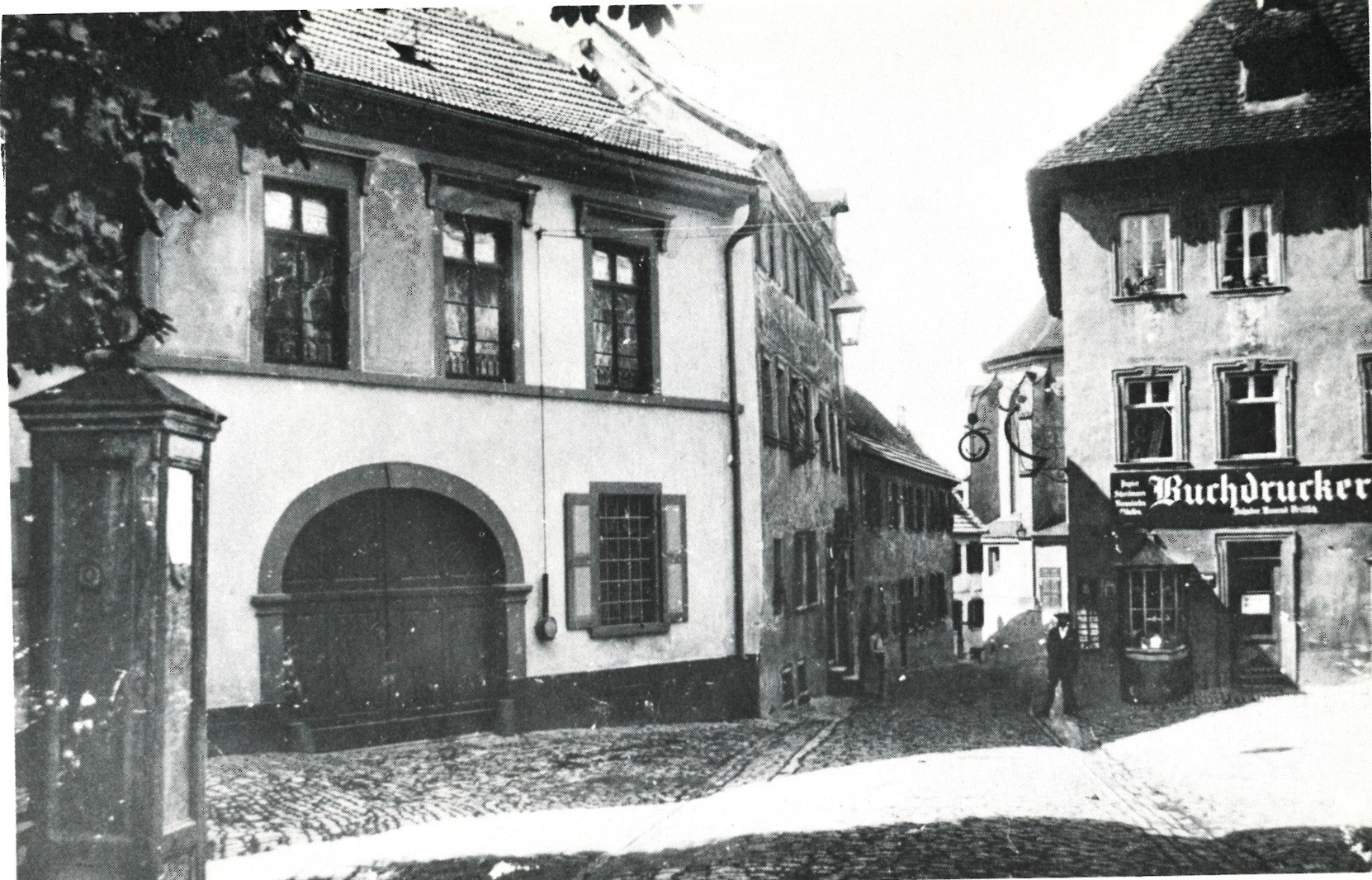 Historische Fotografie, Falterstraße, Dettelbach zwischen 1905-1911